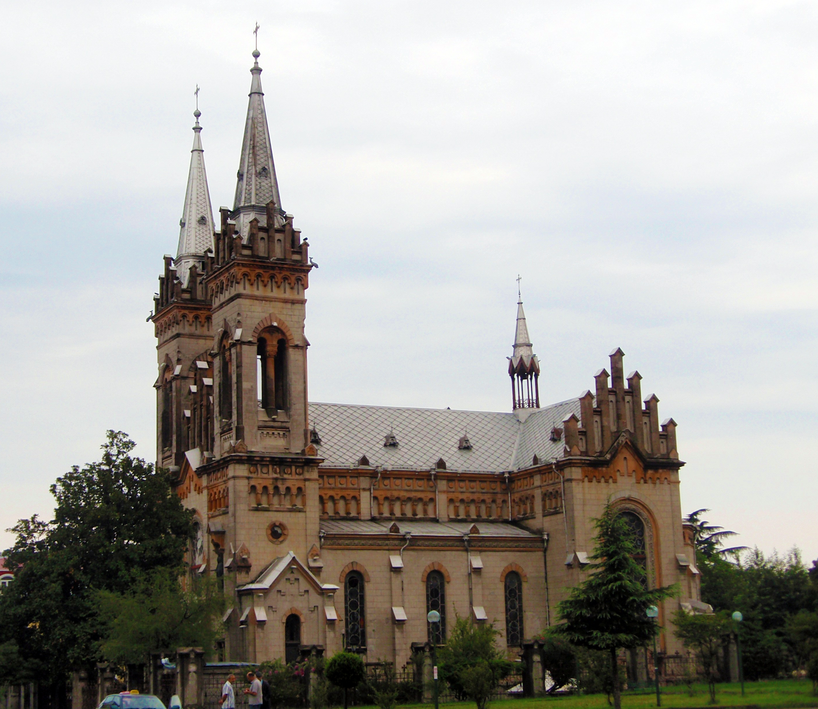 ბათუმის ღვთისმშობლის შობის ტაძარი